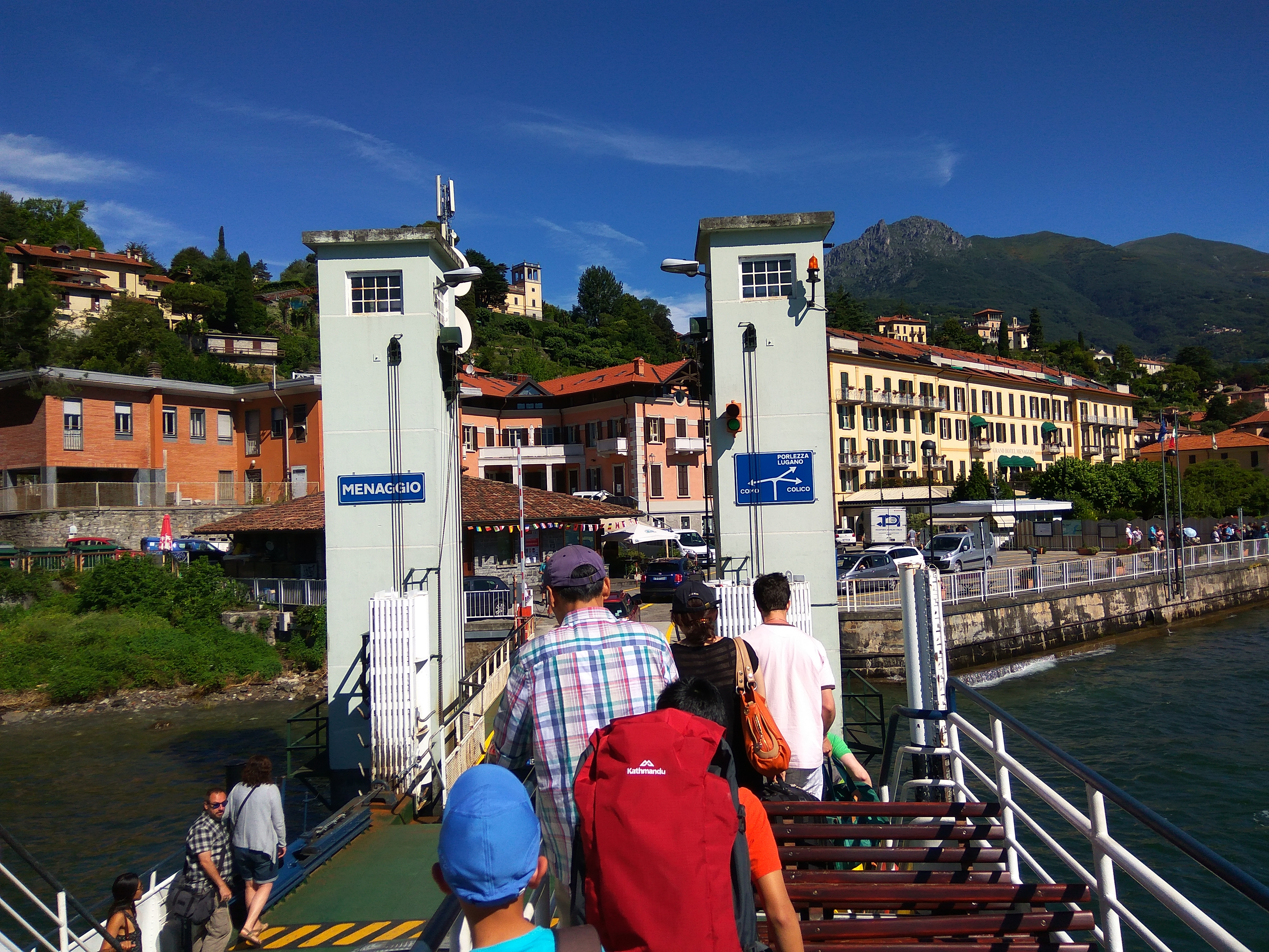 Прибуття поромом до міста Менаджіо